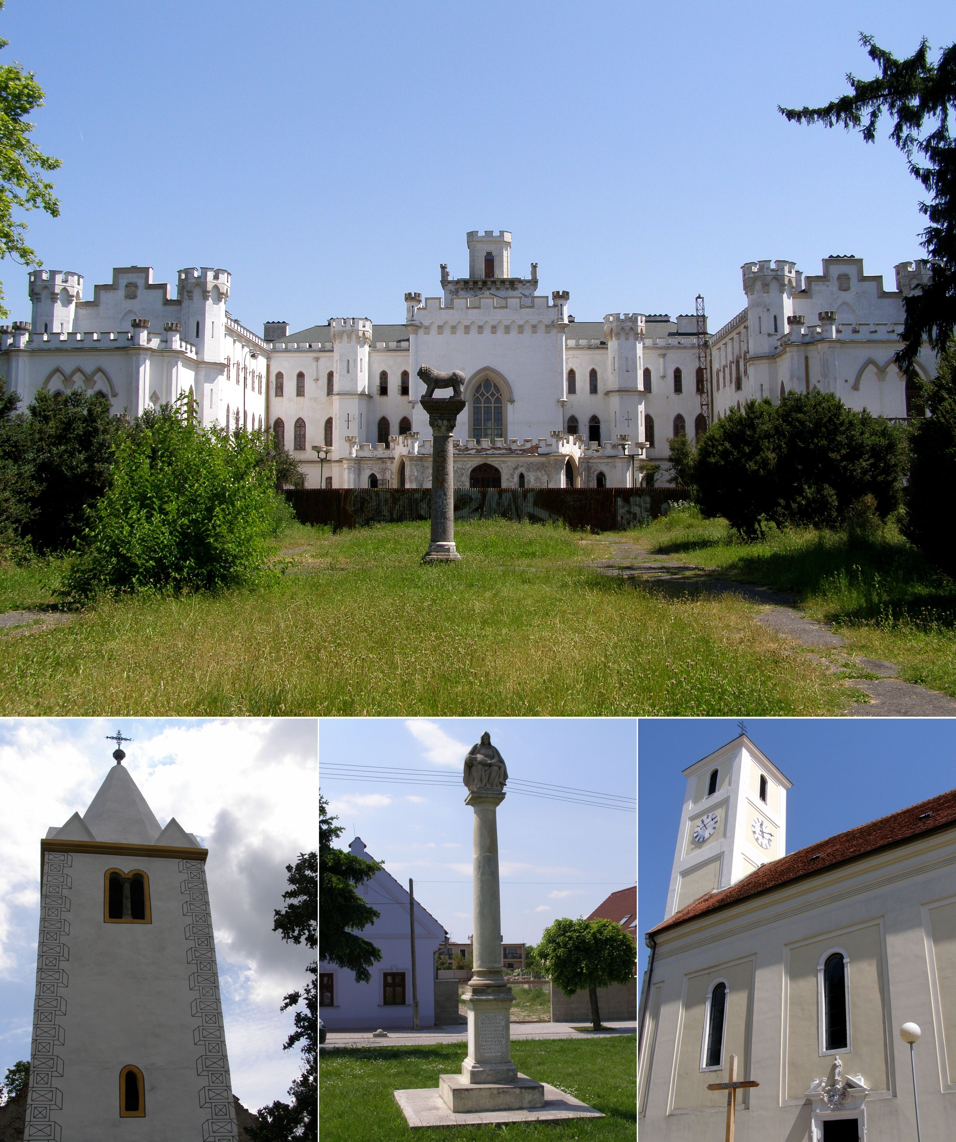 Rusovce. Zhora: kaštieľ v Rusovciach, dole zľava: Kostol svätého Víta, stĺp s Pietou, Kostol svätej Márie Magdalény